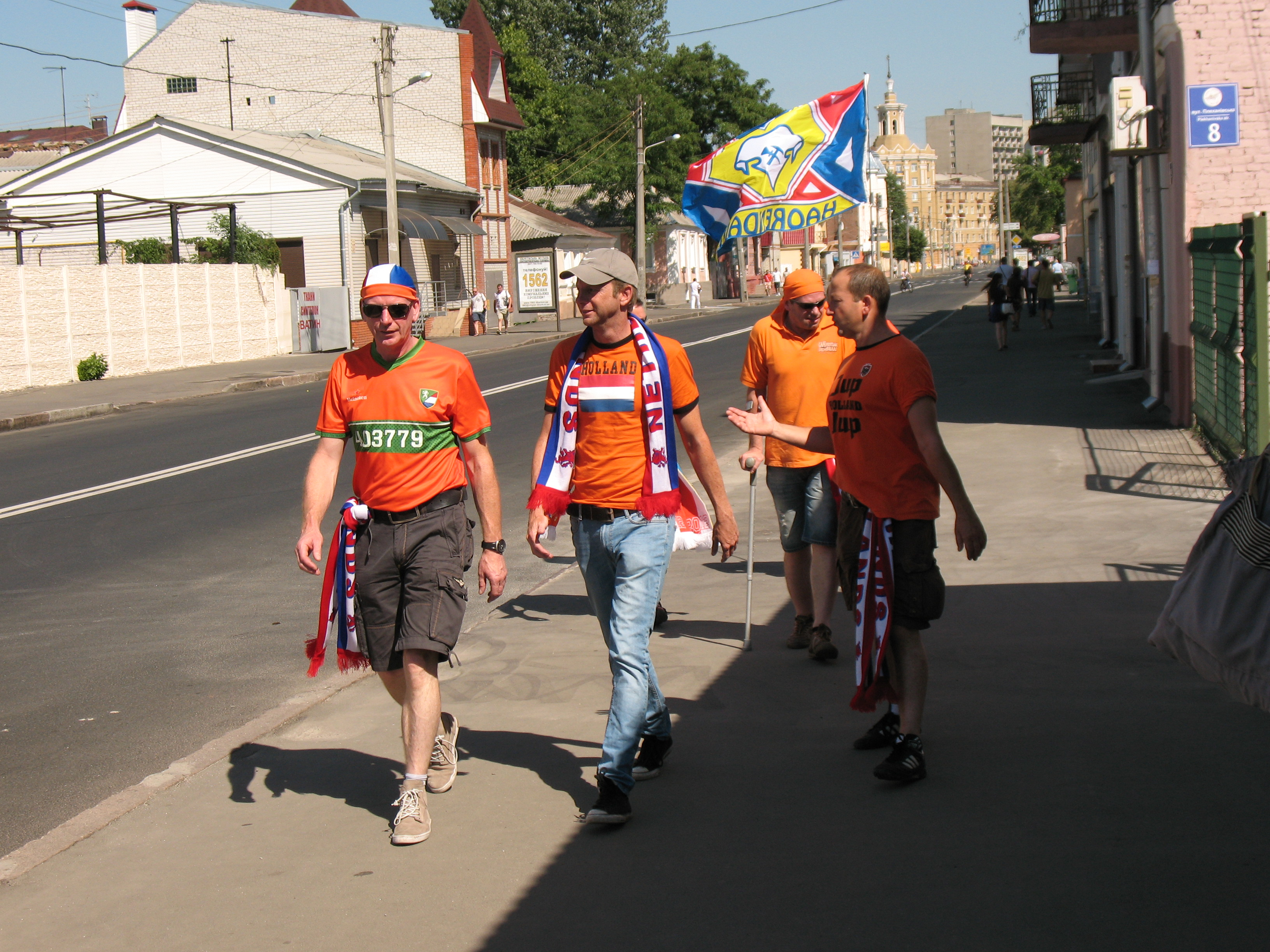 Holland fans in Kharkov City on EURO 2012. Голландские футбольные фаны в Харькове на ул. Плехановской перед матчем ЕВРО 2012 Голландия - Германия (21:45, 1:2) 13 июня 2012 года. Вдали видно здание б. кинотеатра "Родина" со шпилем.